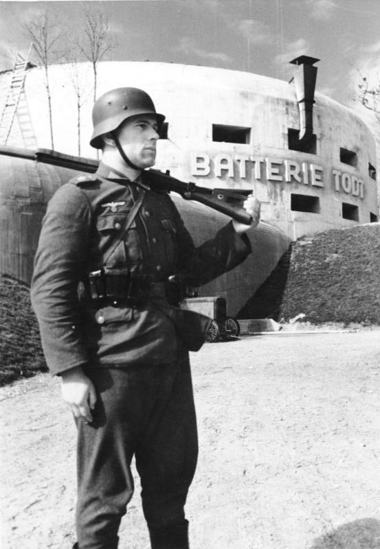 Wache vor der Batterie Todt. Der deutsche Soldat weiss, dass er sich auf das Verteidigungssystem verlassen kann, dass die OT [Organisation Todt] ihm in schwerer, langer Arbeit schuf. Aufnahme: OT-Kriegsberichter Maier